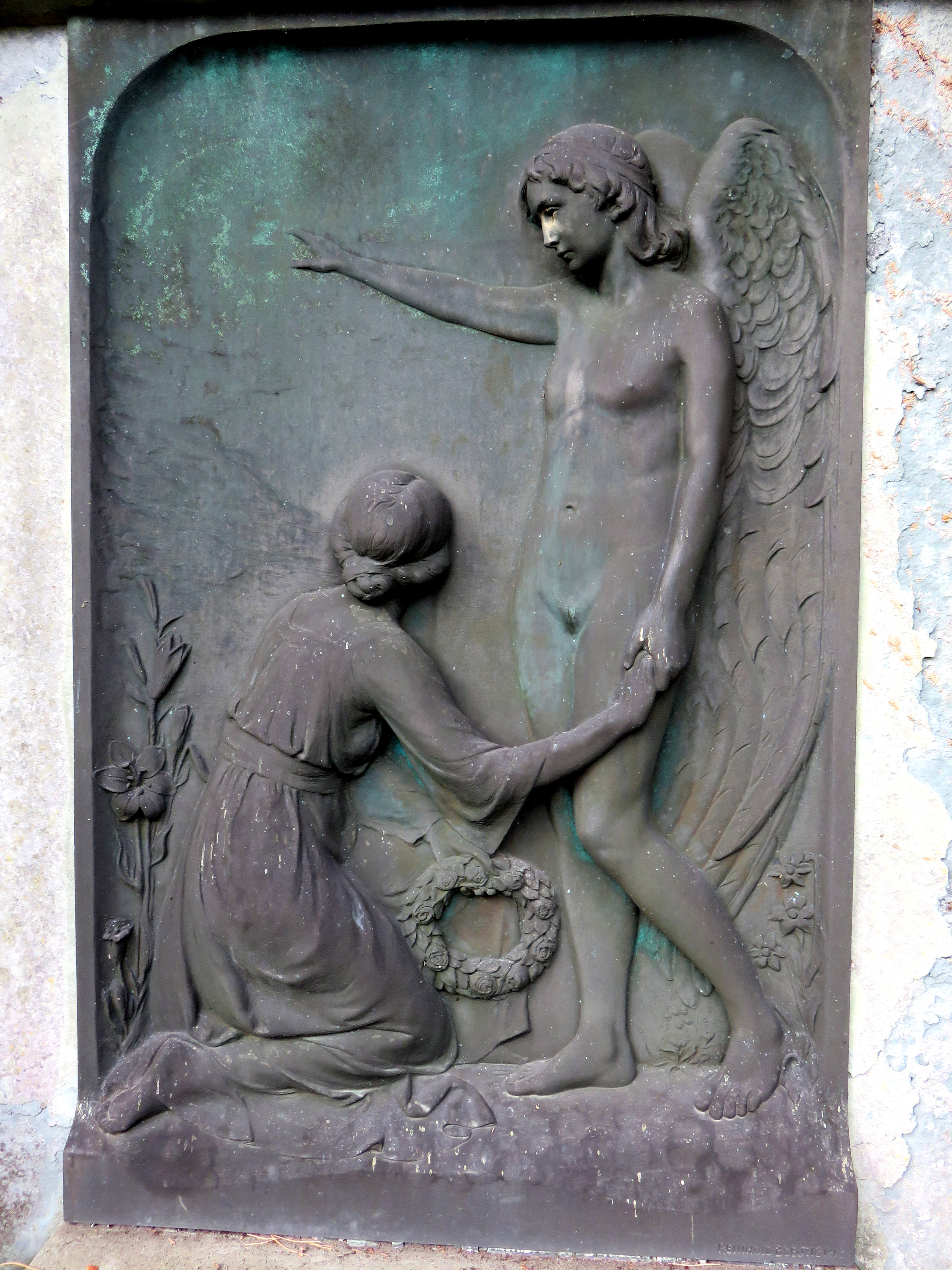 Familienrab Gültzow, Friedhof Ohlsdorf, Planquadrat AD 13 (nördlich Nordteich). Das Grabmal wurde 1918 vom deutschen Bildhauer Reinhold Boeltzig geschaffen.